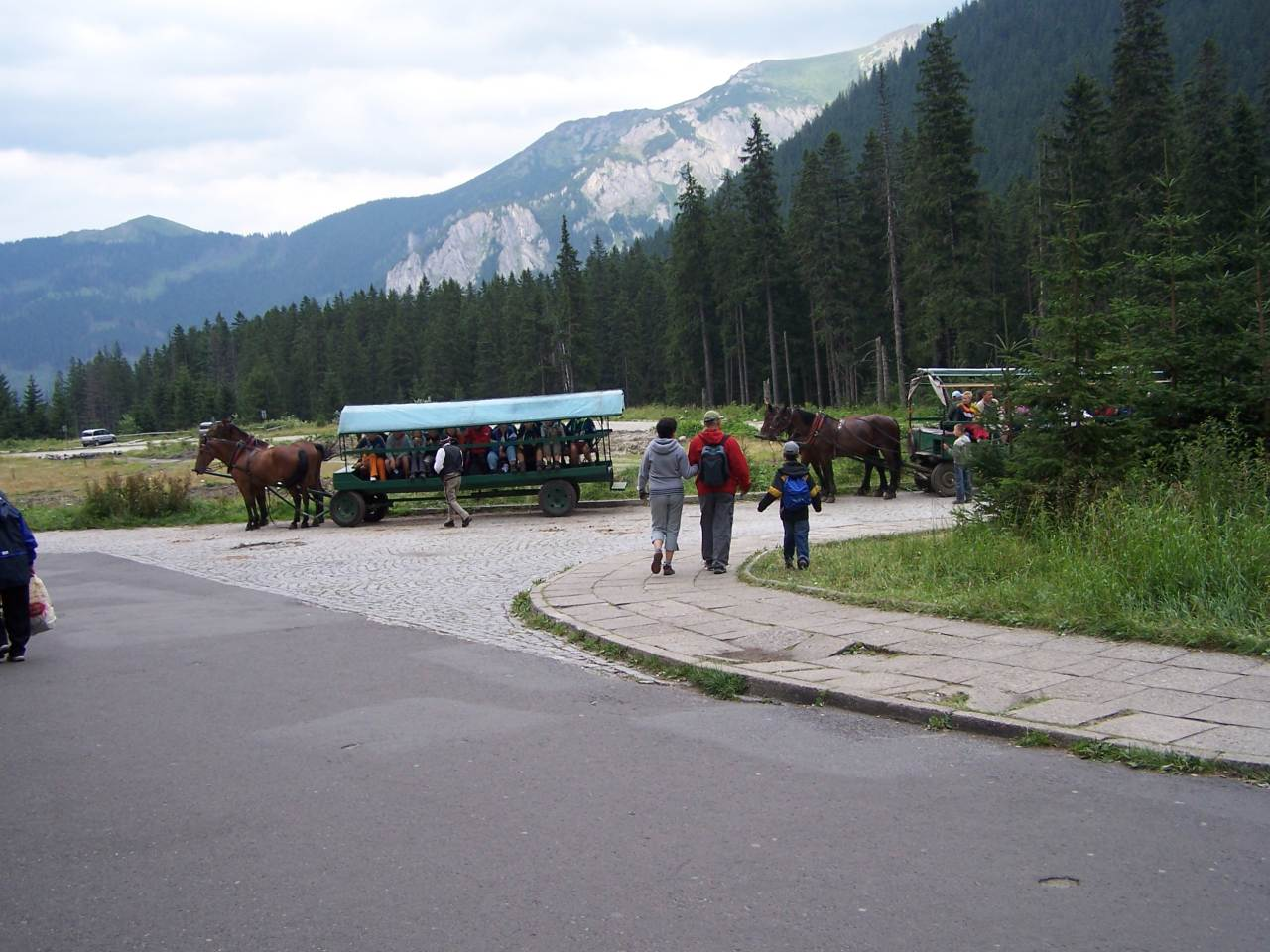 Polana Włosienica poniżej Morskiego Oka w Tatrach